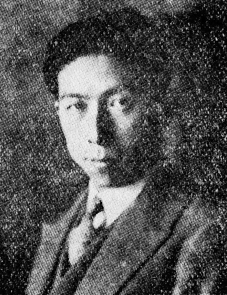 橋本國彦（1904-1949）